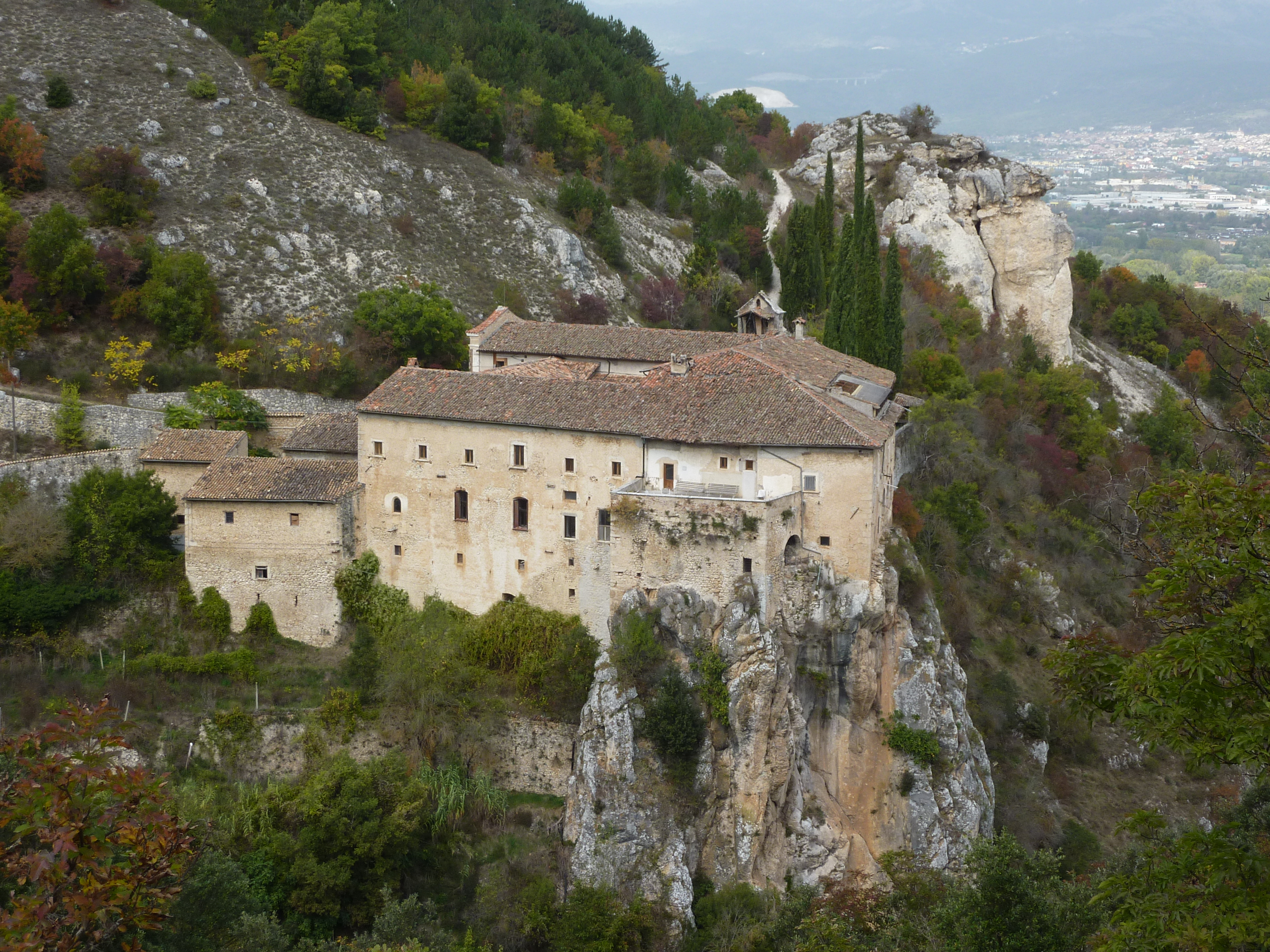 Ocre (AQ): Convento di Sant'Angelo